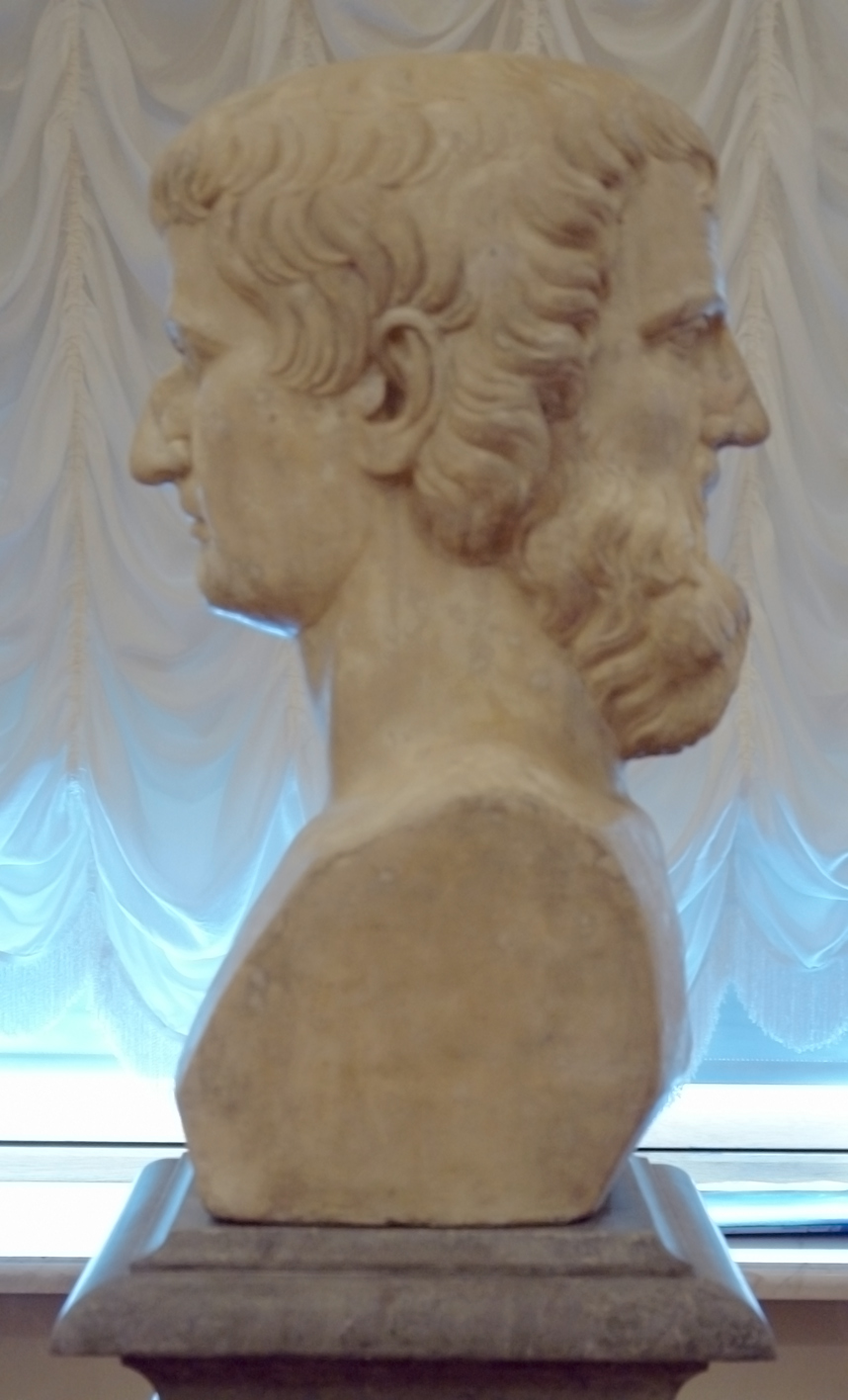 Двуликий Янус (Вид сбоку). Неизвестный скульптор, начало XVIII в. (Мрамор, ЛС-15) Михайловский Музей, Санкт-Петербург, Россия.